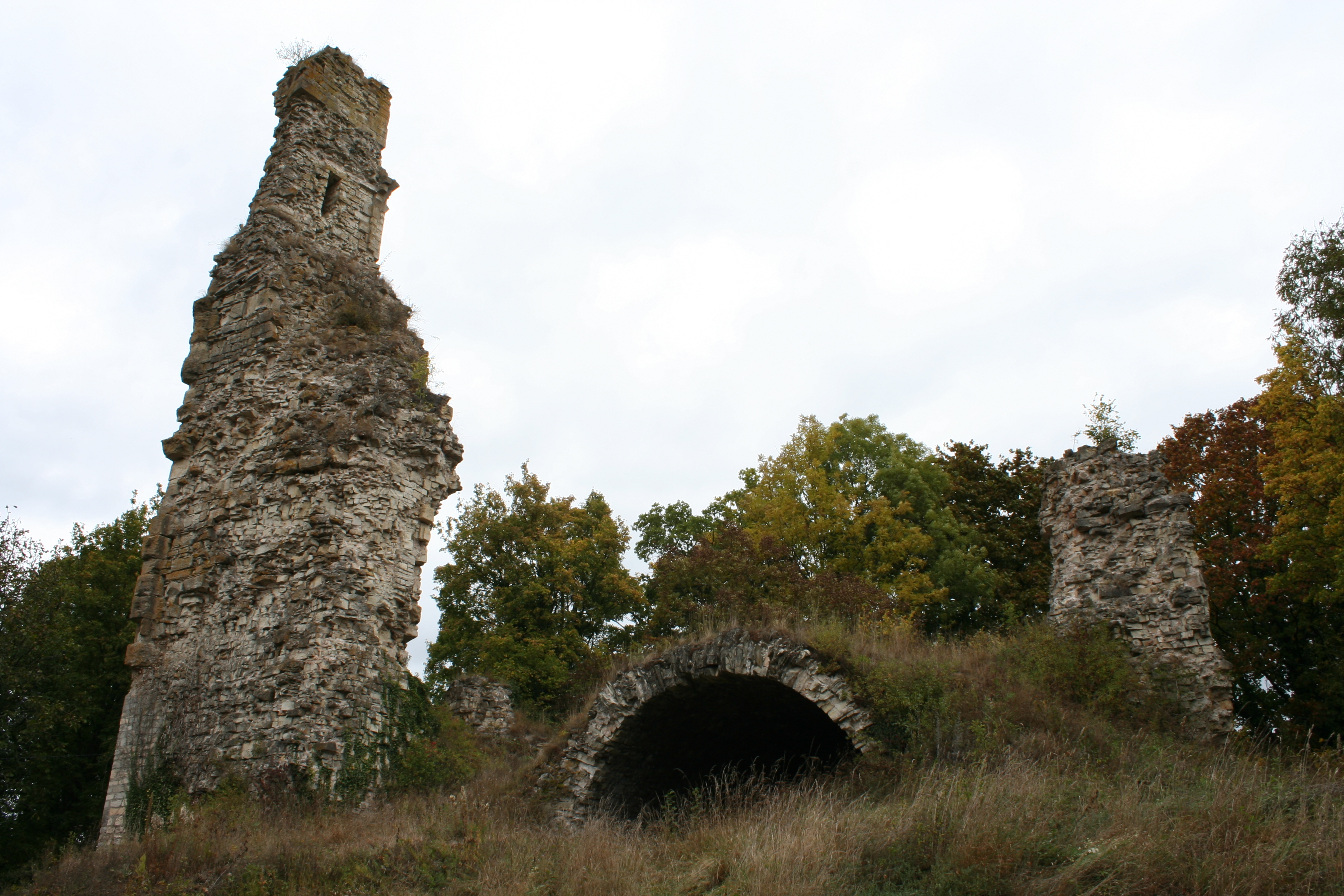 Château de Bainville-aux-Miroirs - Vestiges